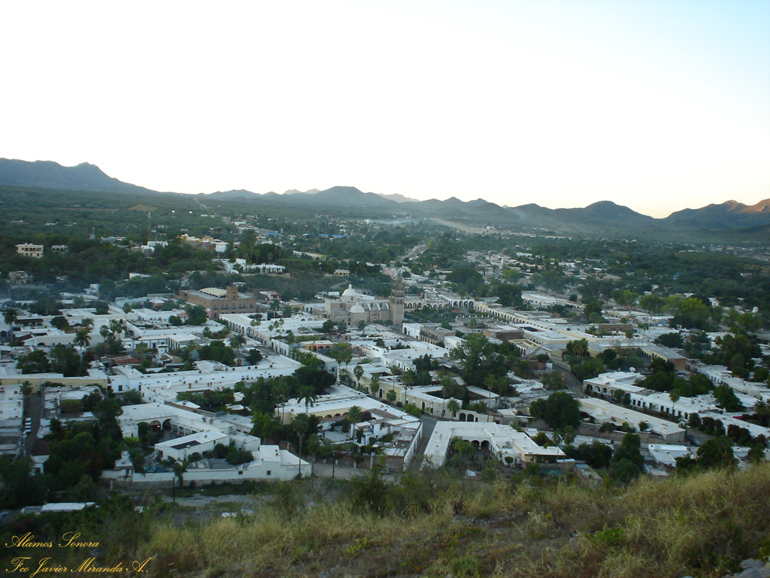 Vista panoramica de Álamos desde "el mirador".